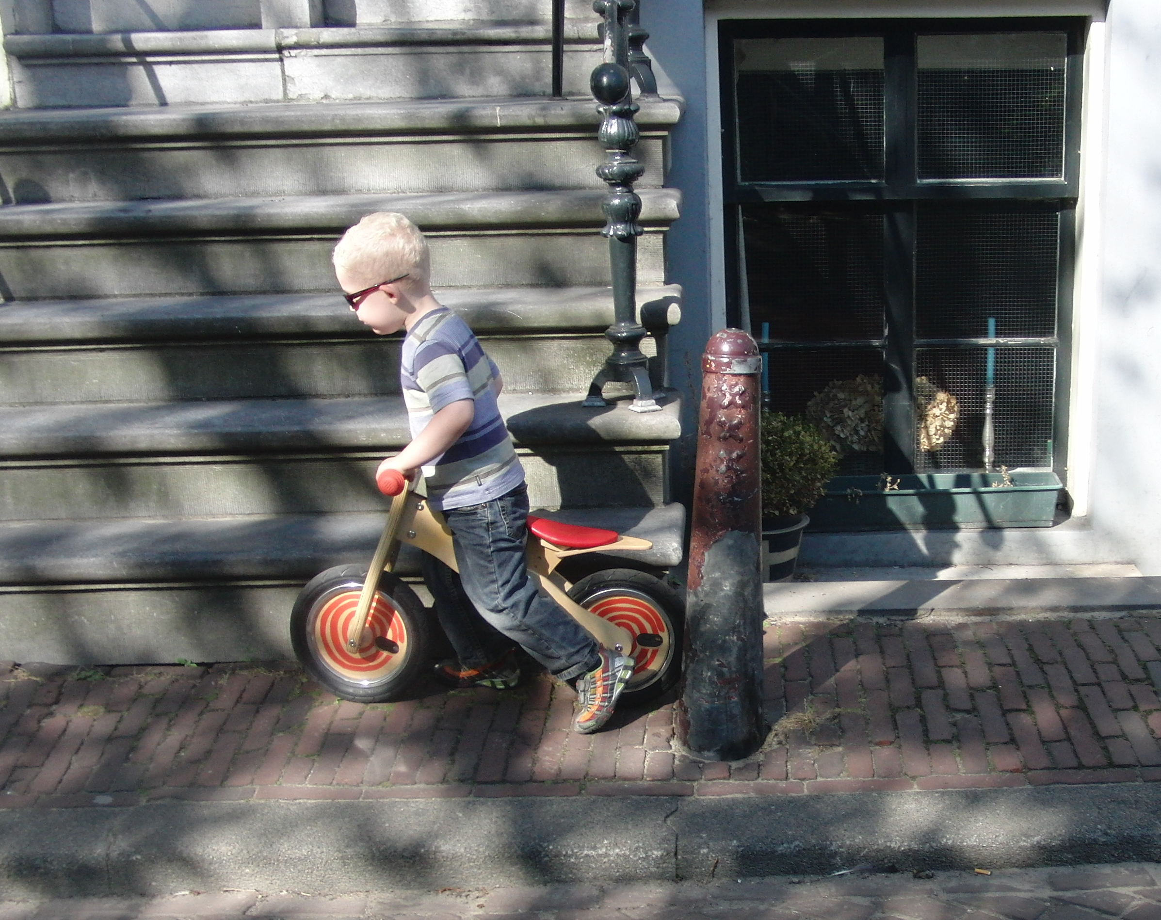 Jongetje met loopfiets in Amsterdam 2009